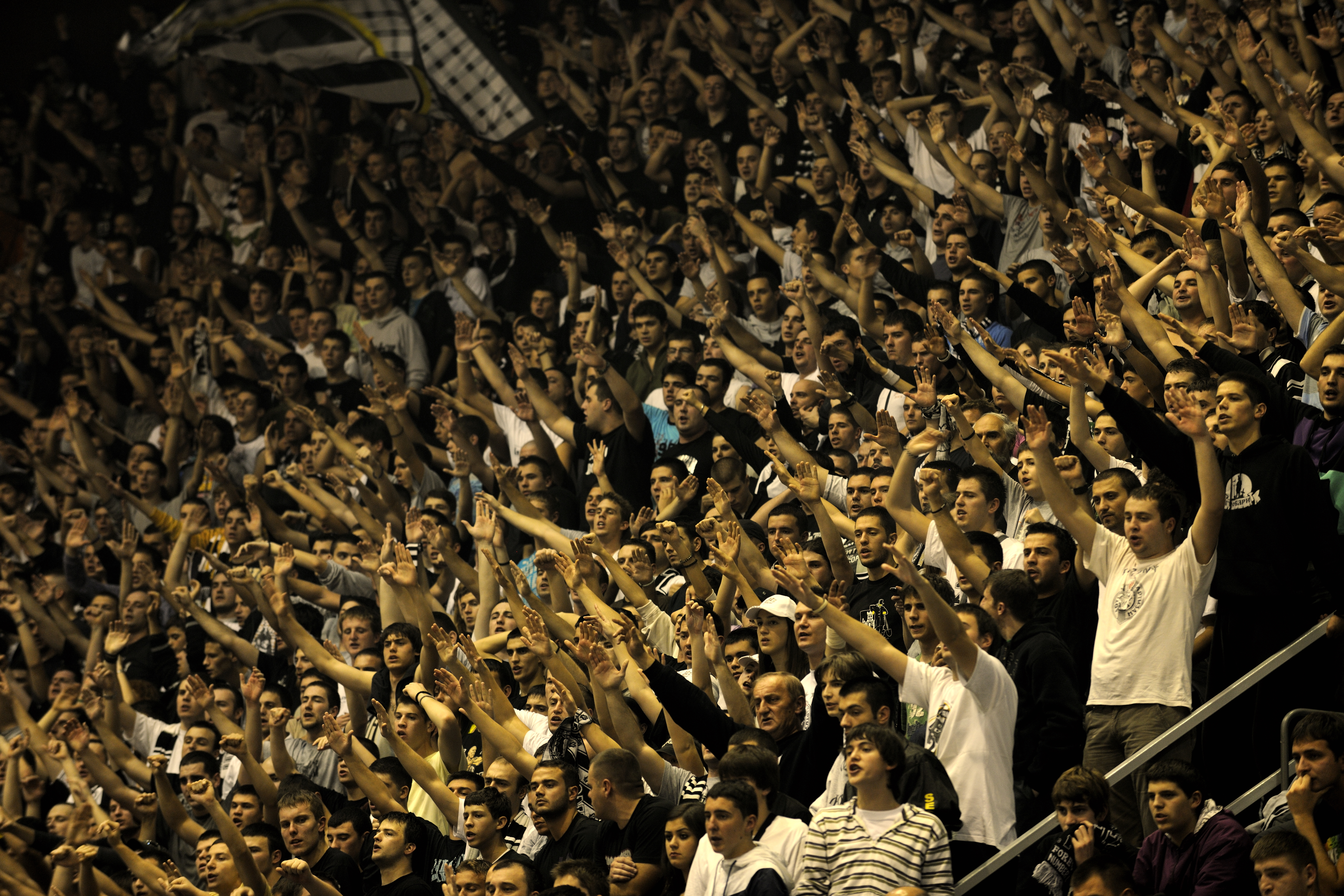 _DSC6920